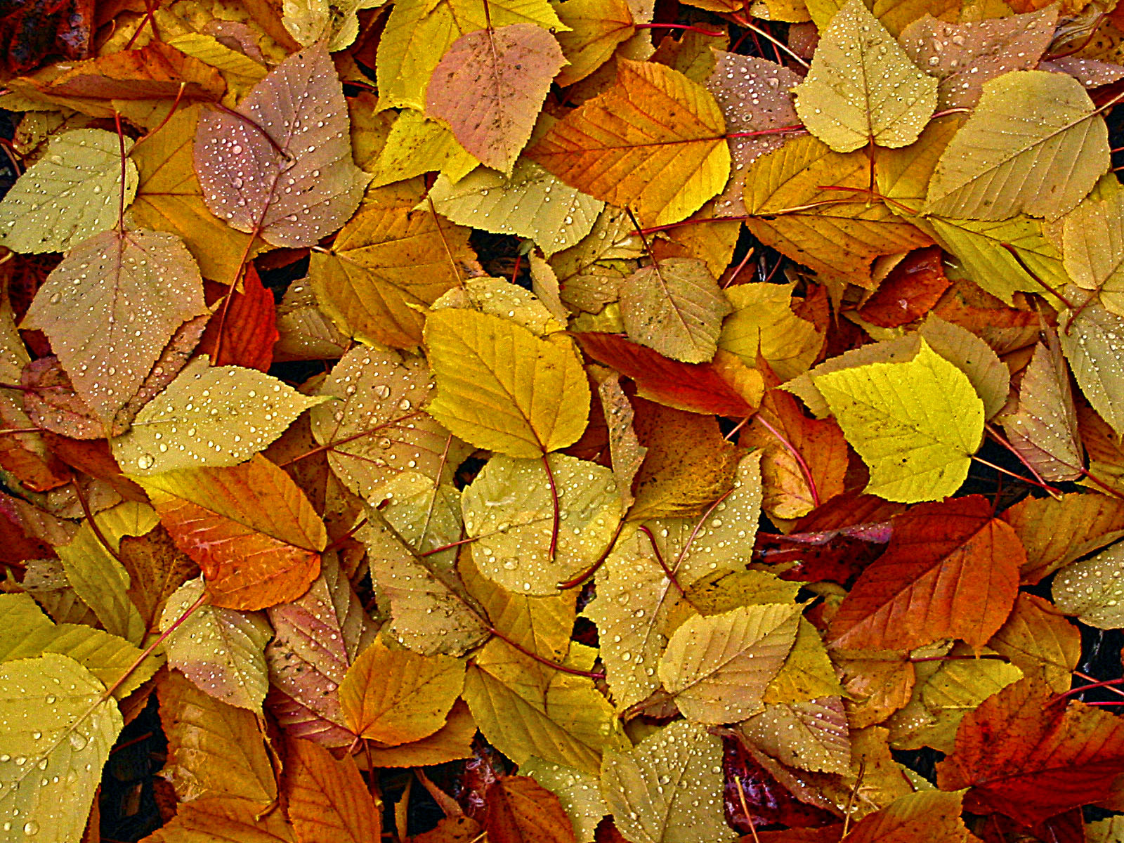 500px provided description: Fall leaves [#fall colors ,#Fall ,#Autumn ,#Leaves ,#Autumnal leaves]